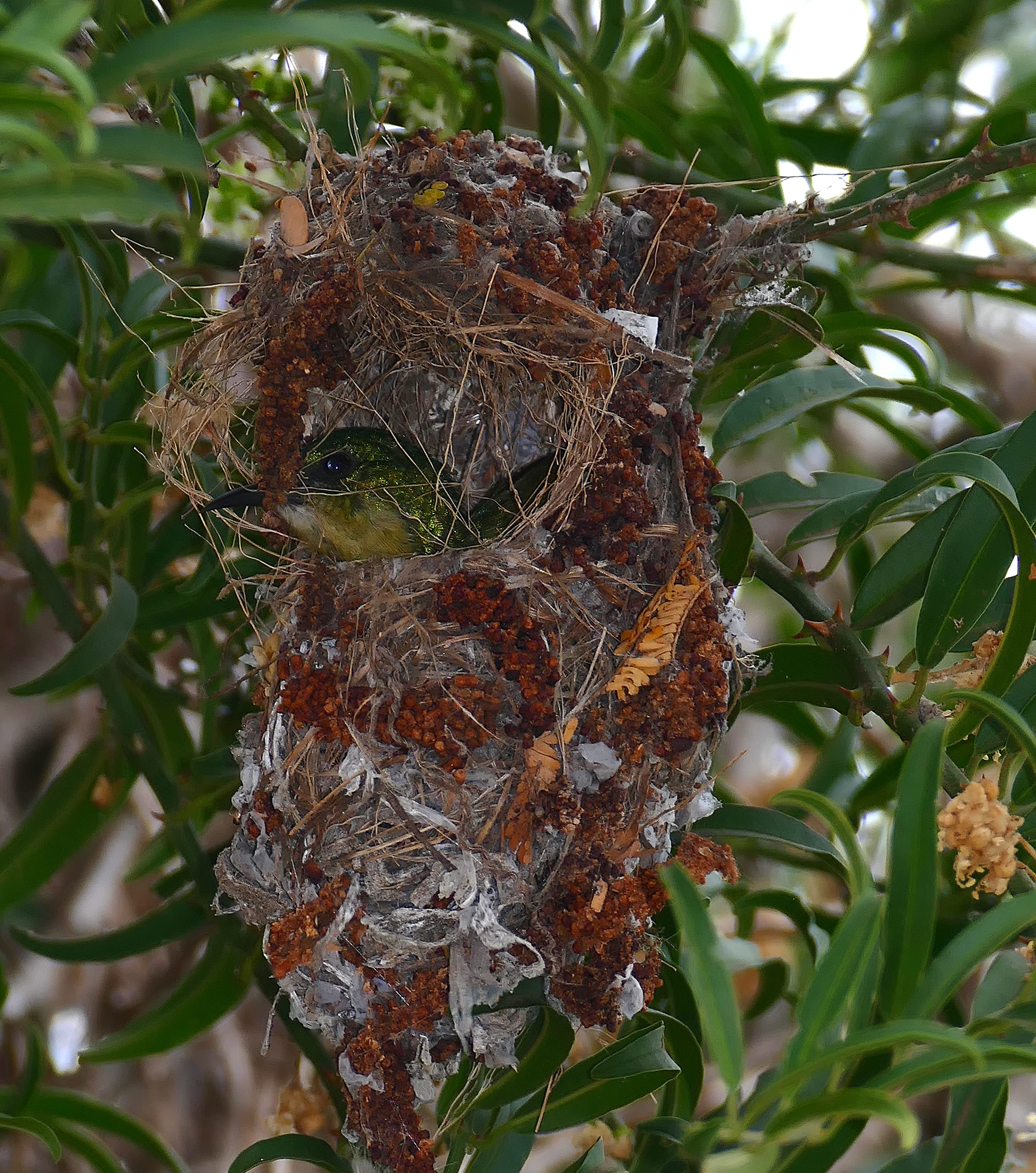 kuMasinga Hide, uMkhuze Game Reserve, Kwazulu-Natal, SOUTH AFRICA